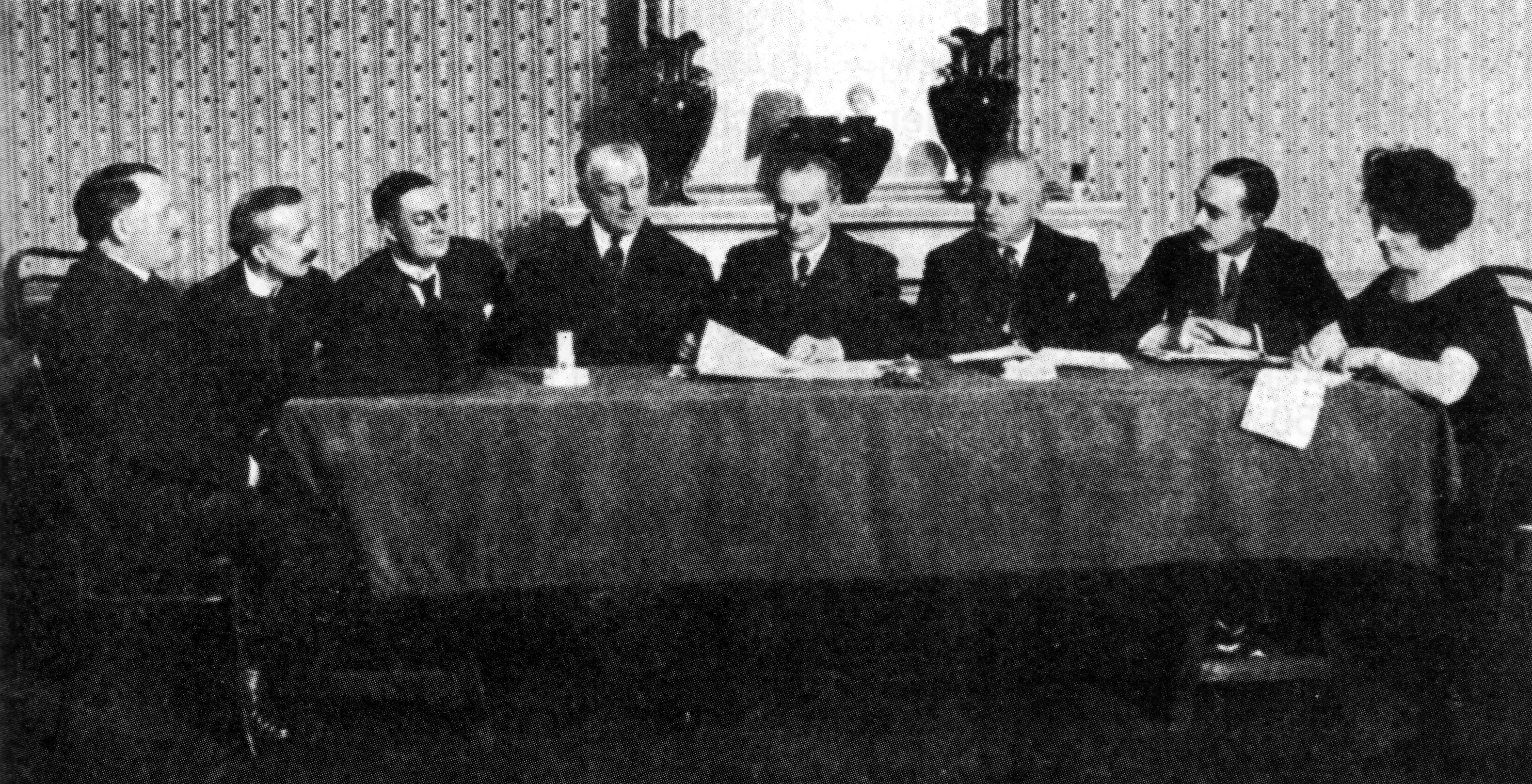 Die Gründungsmitglieder der „Fédération Internationale des Amateurs de Billard“ (FIAB) am 16./17. Dezember 1923 im Brüsseler „Café Manix“: (v.l.) • Alexandre Avé (FRA) • Rudolphe Agassiz (SUI) • Hans Jenny (SUI) • Charles Faroux (FRA) • Raymond (Comte) de Drée (FRA) • Ferdinand Denis (BEL) • Joseph Baudart (BEL) • unbekannte Protokollantin